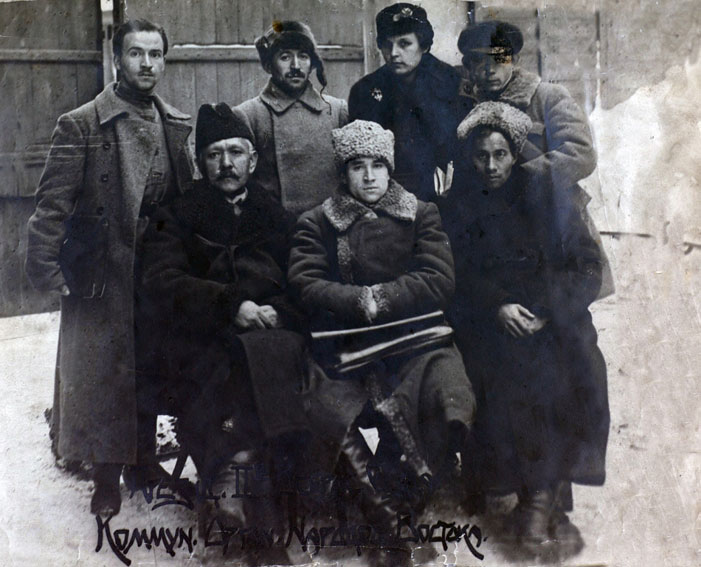 Делегаты II Всероссийского съезда коммунистических организаций народов Востока, Москва, 15 декабря 1919 года